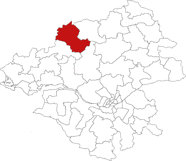 Carte de localisation du canton de Saint-Nicolas-de-Redon (France, Loire-Atlantique)